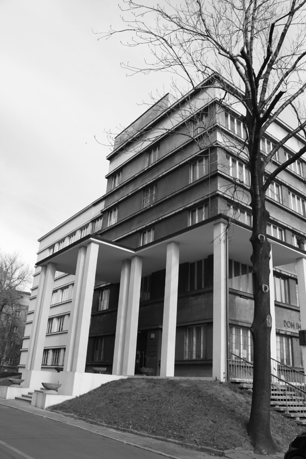 Kraków, Dom Legionisty (1931-34), zaprojektowany przez Adolfa Szyszko-Bohusza